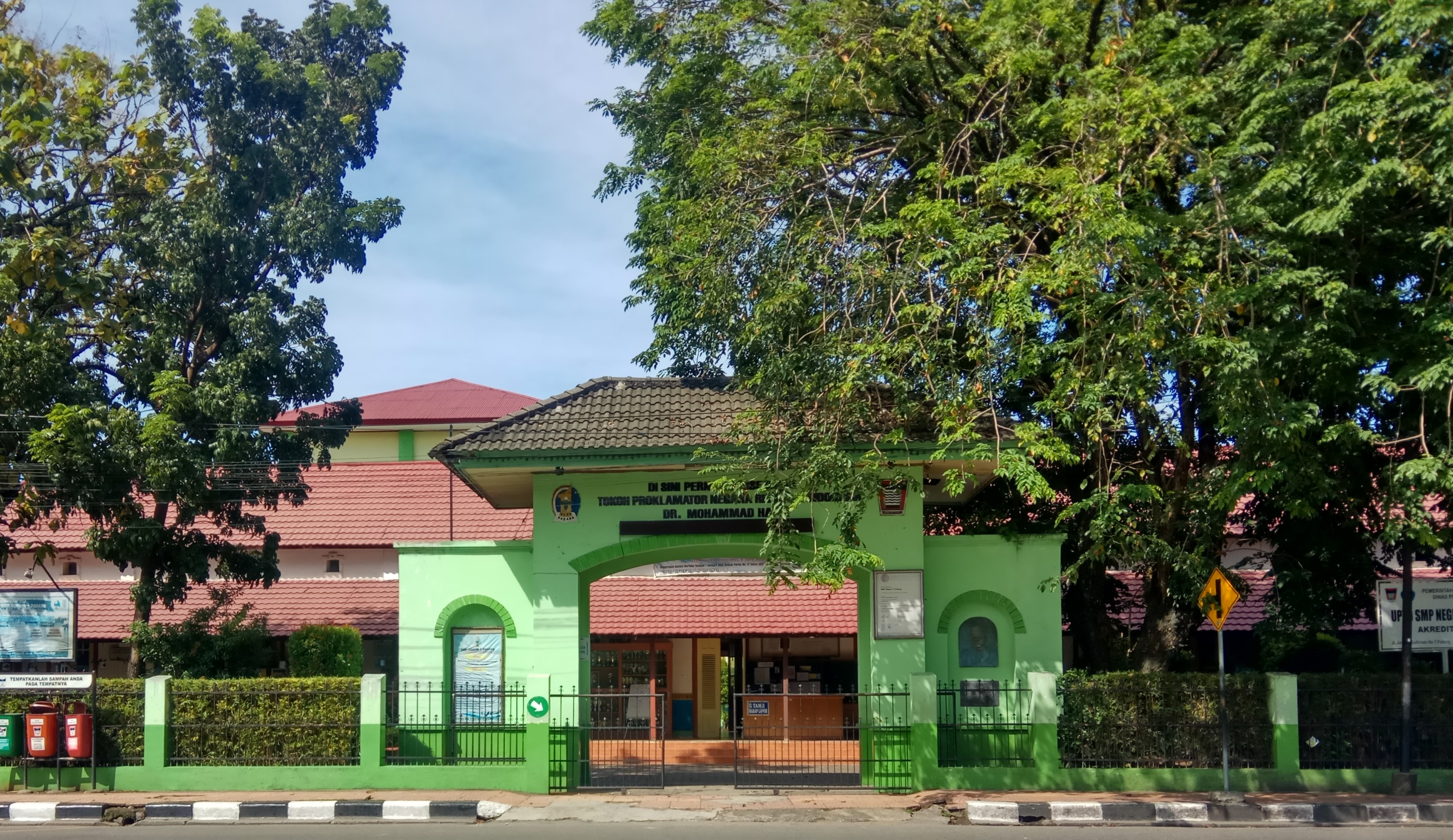 Gerbang SMP Negeri 1 Padang